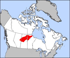 Bassin versant du fleuve Churchill (Baie d'Hudson). Adapté de l'image Nelson-bassin.png.